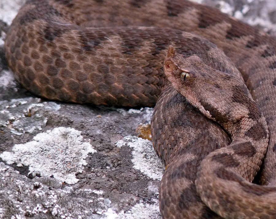 Пепелянка (Vipera ammodytes)снимана в Северна България, с.Горталово, гр.Плевен